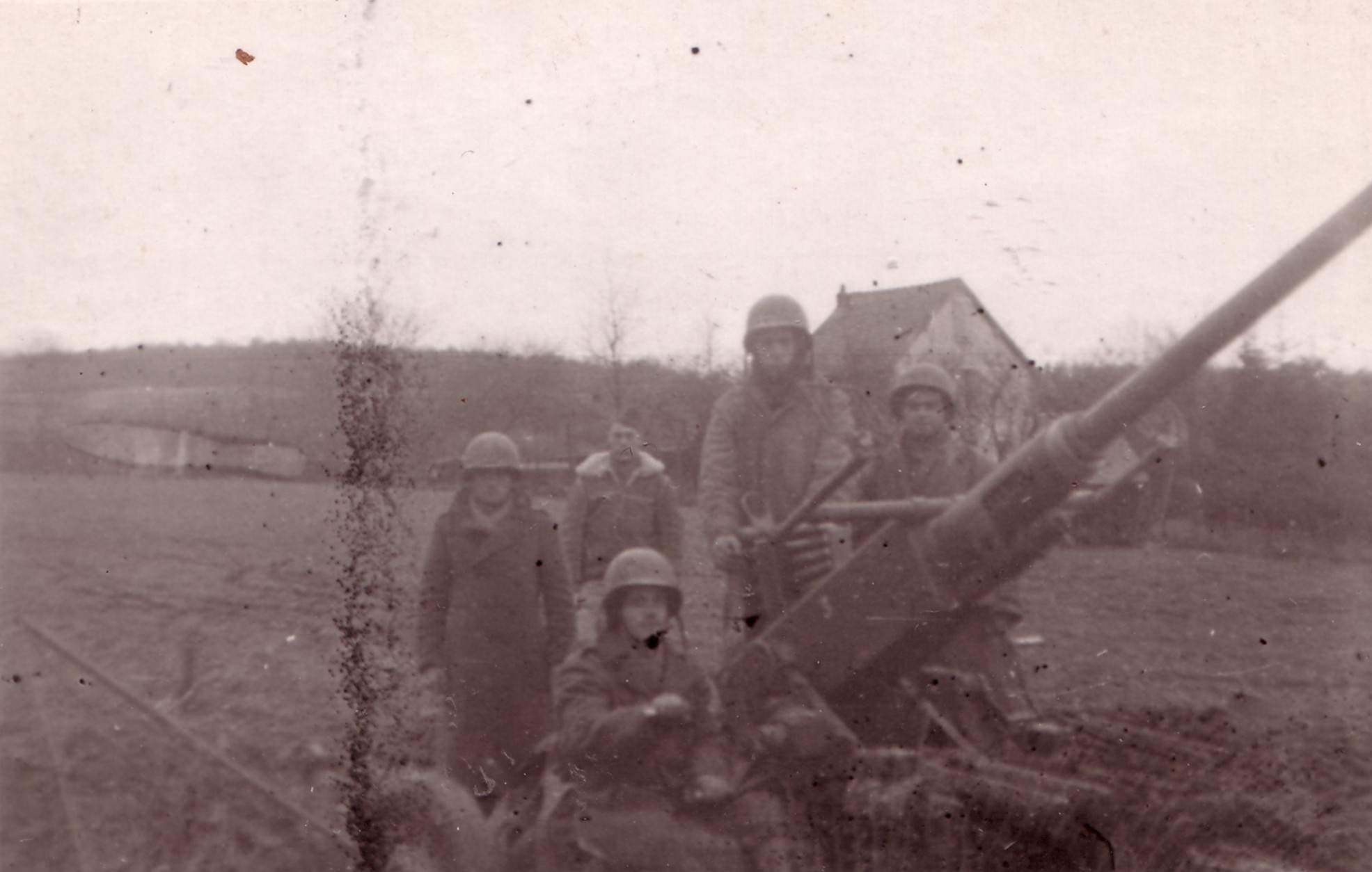 Canon de 40mm Bofors, 31e groupe autonome des forces terrestres antiaériennes.